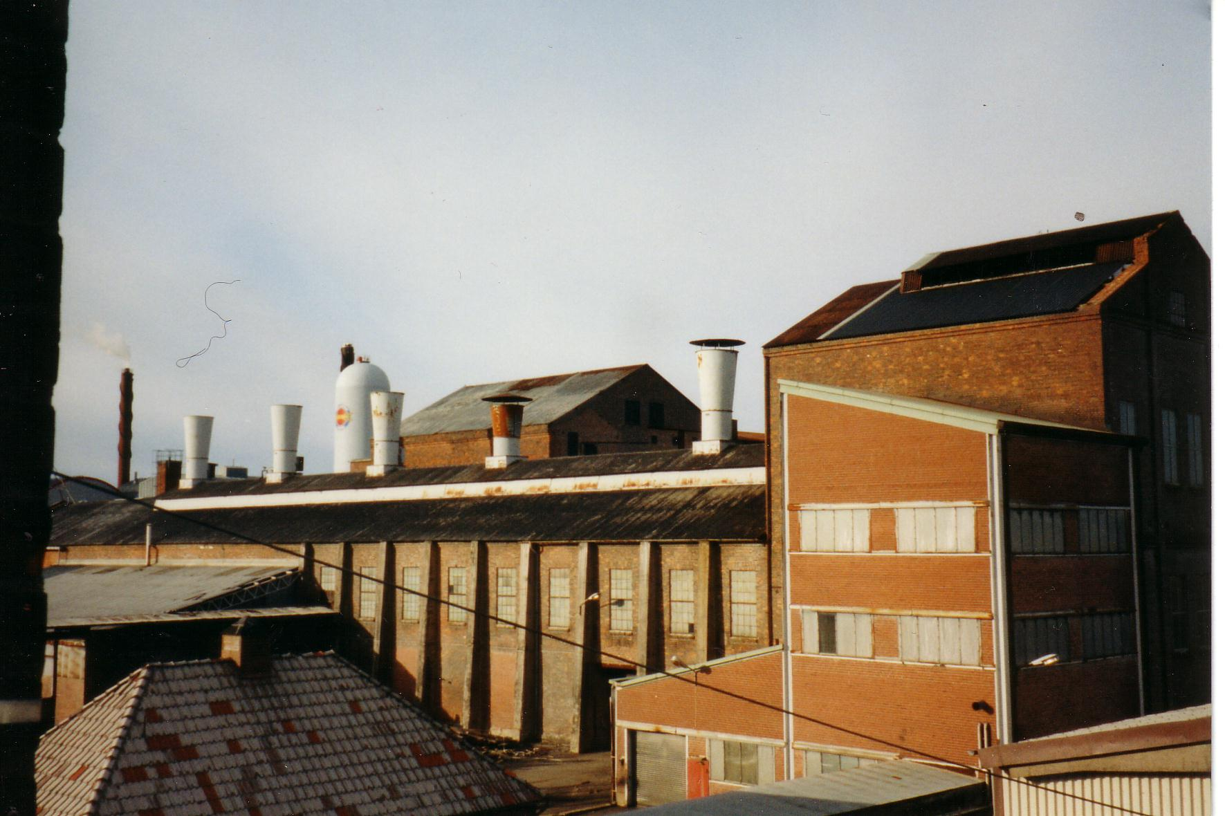 Molybdenrosteriet till höger och vanadinverket till vänster hos Ferrolegeringar. Byggnaden var uppförd omkring 1913. Revs hösten 2003.